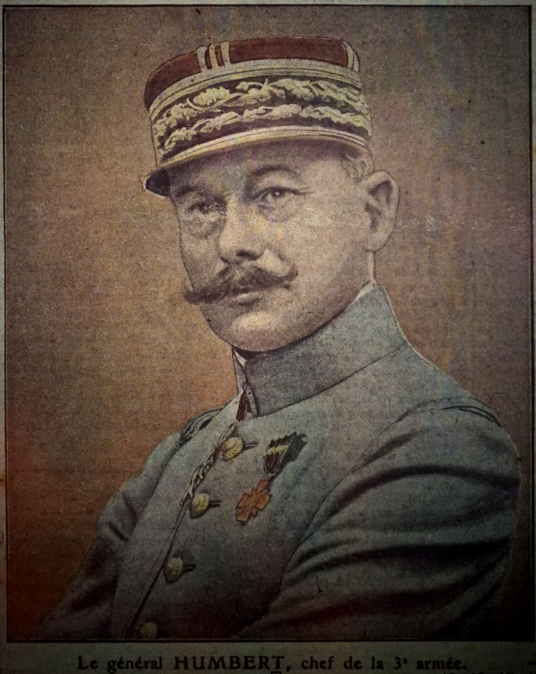 Image de Georges Humbert.